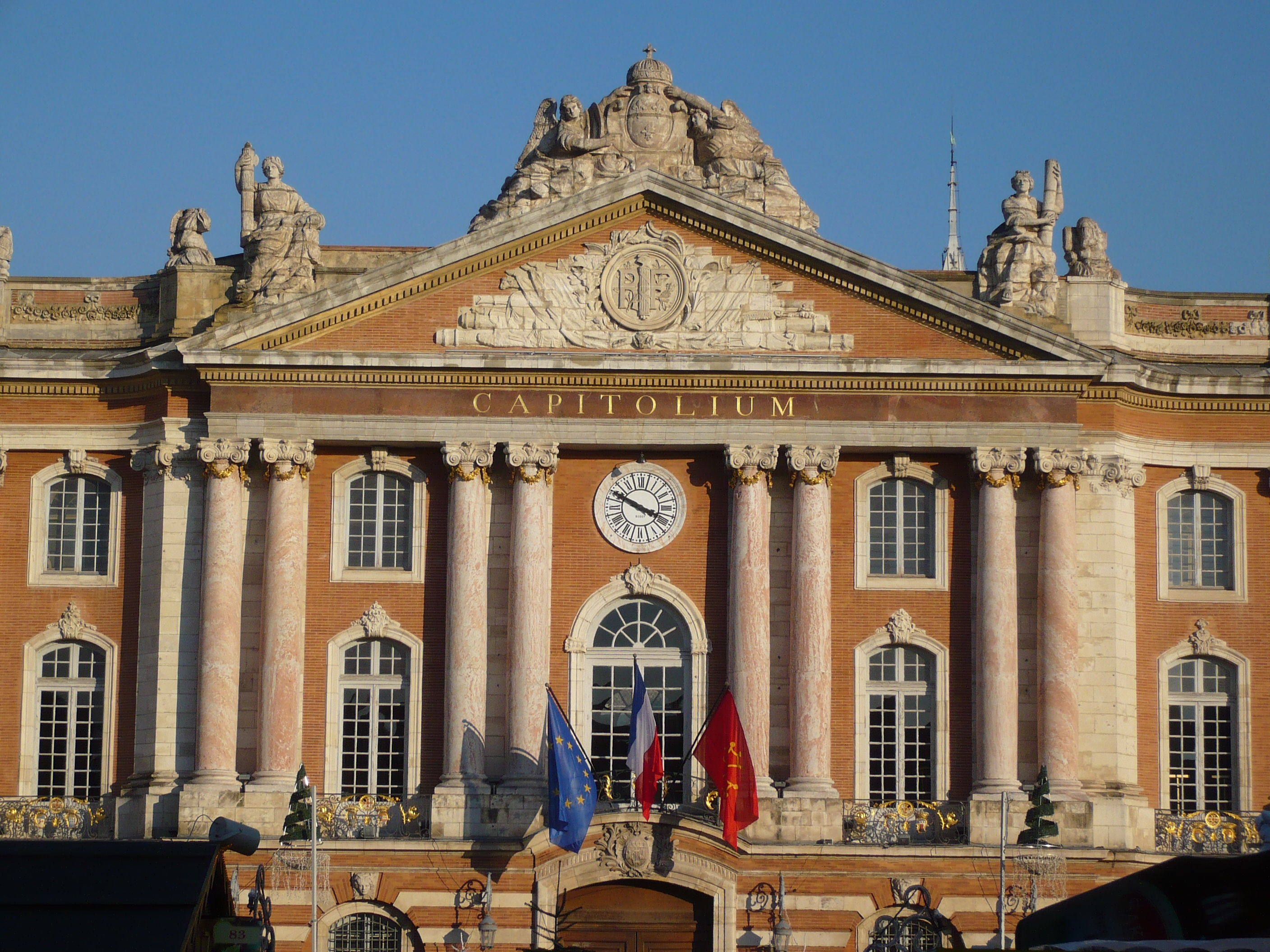 Partie centrale de la façade du Capitole, hôtel de ville de Toulouse, France.